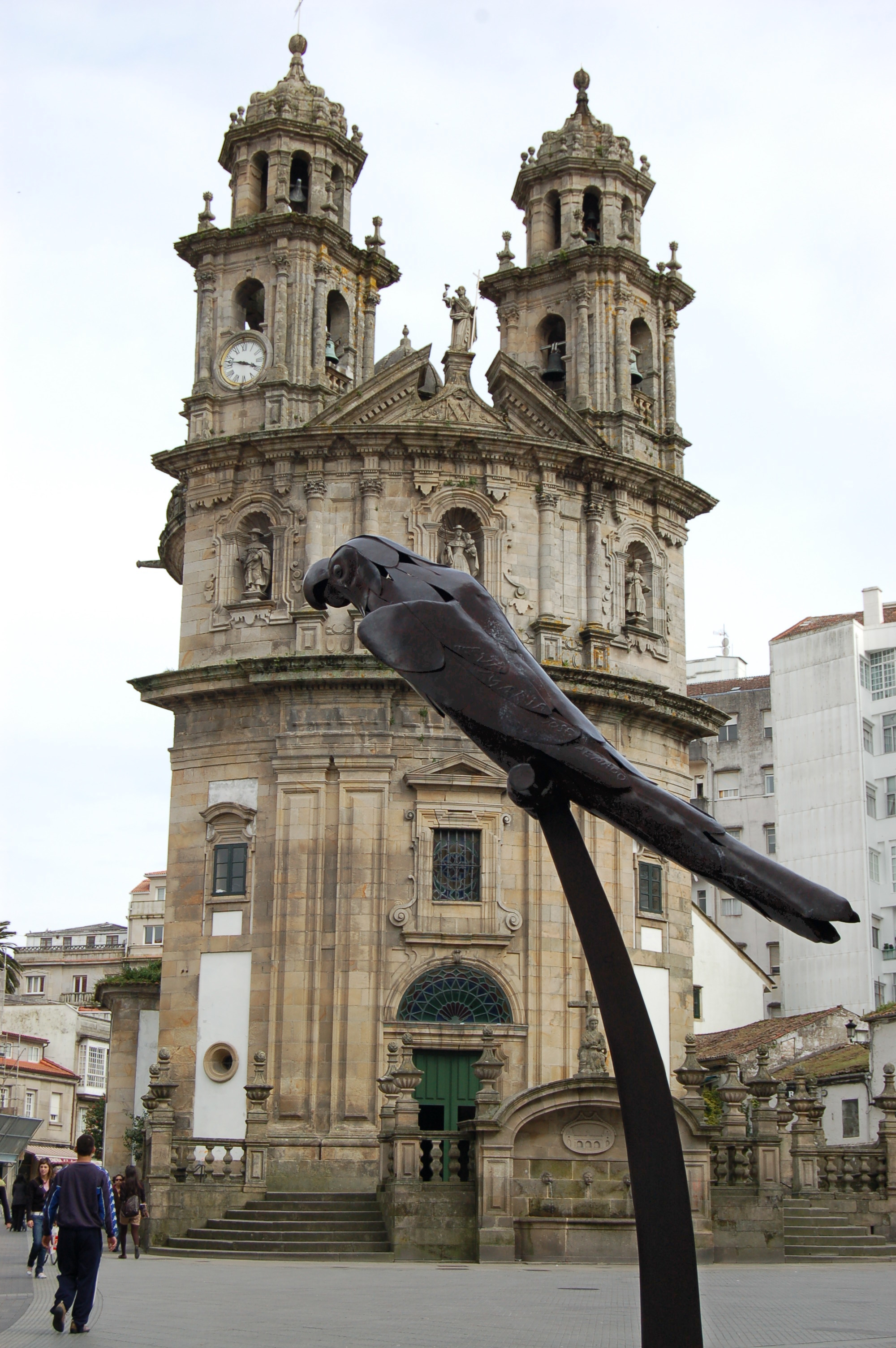 Estatua do loro Ravachol, coa capela da Virxe Peregrina detrás, en Pontevedra